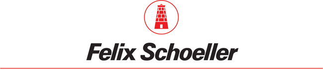 Logo Felix Schoeller Gruppe